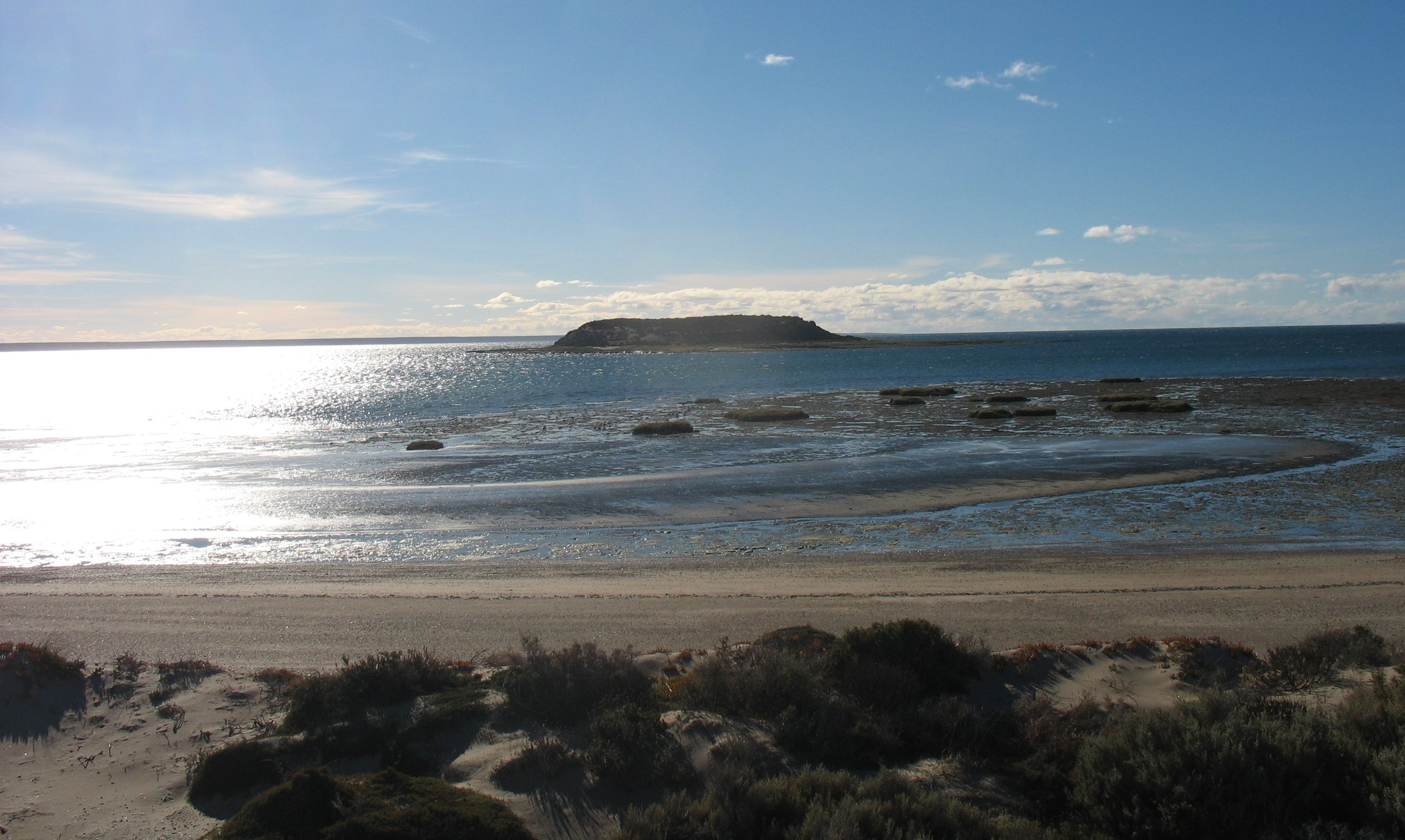 Vista de lejos de la isla de los Pájaros (Provincia del Chubut)